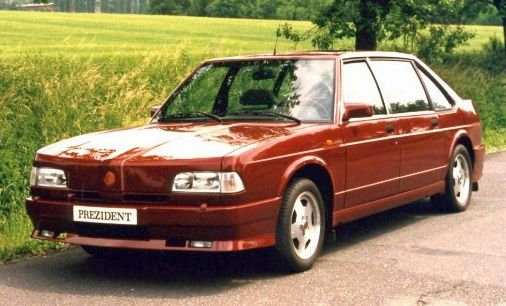 Tatra Prezident - Prototype (1994) Photo Archive: Ondrej Ertl